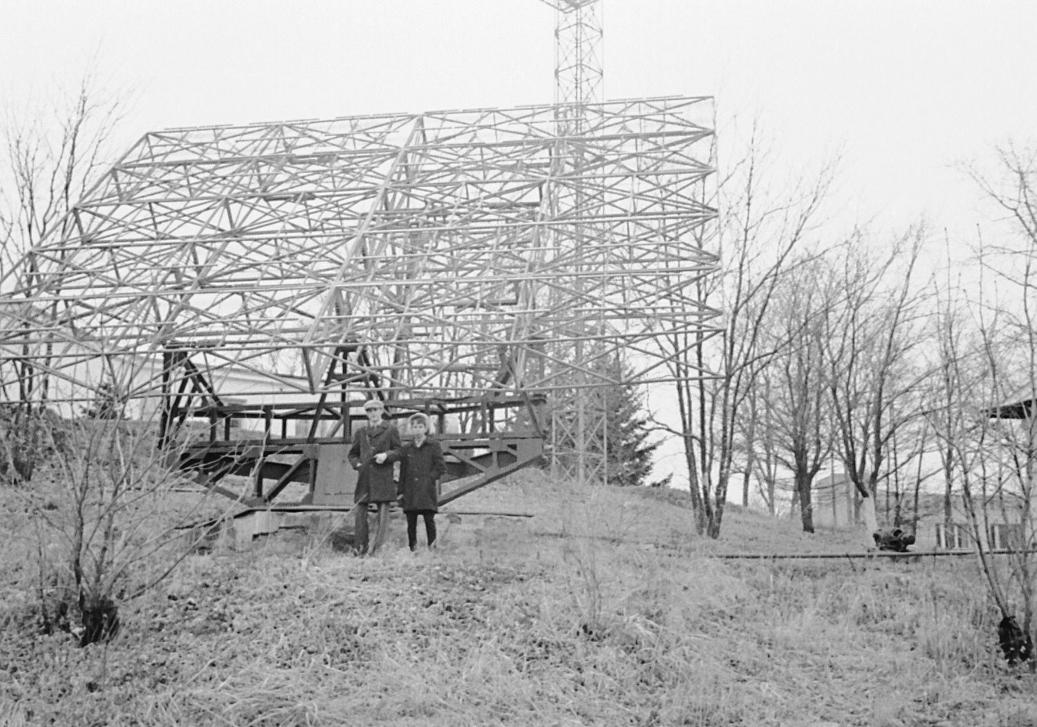 Уссурийск Служба Солнца 1978 год